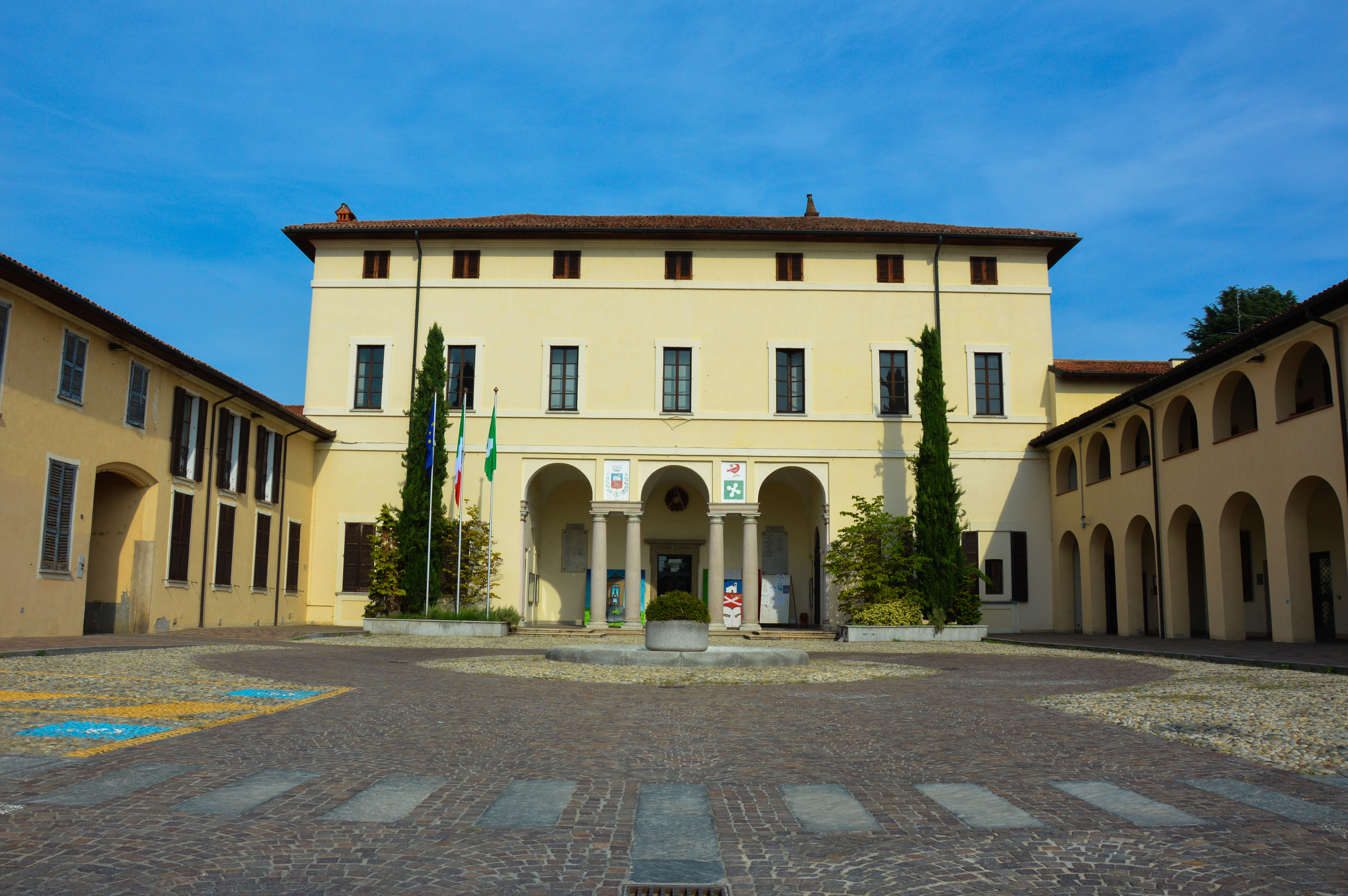 palazzo Fagnani Arese Robecchetto con Induno di Martina Garavaglia This is a photo of a monument which is part of cultural heritage of Italy.